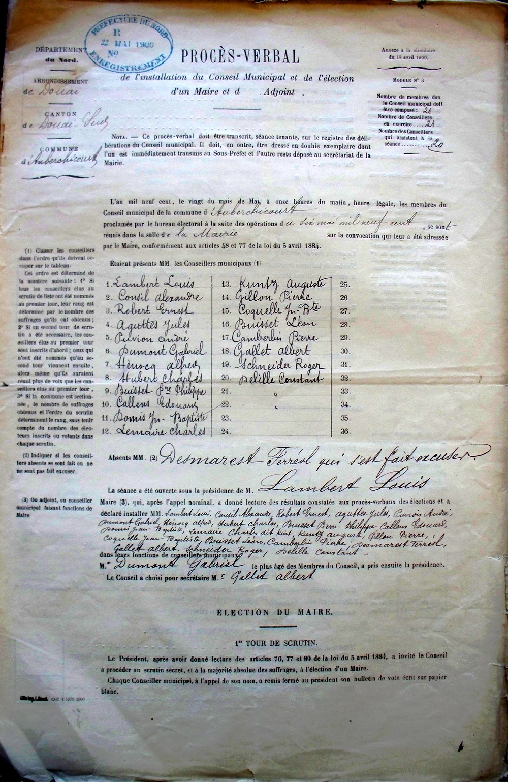 Procès verbal d'installation du conseil municipal le 20 mai 1900, en 2éme position: CONSIL Alexandre